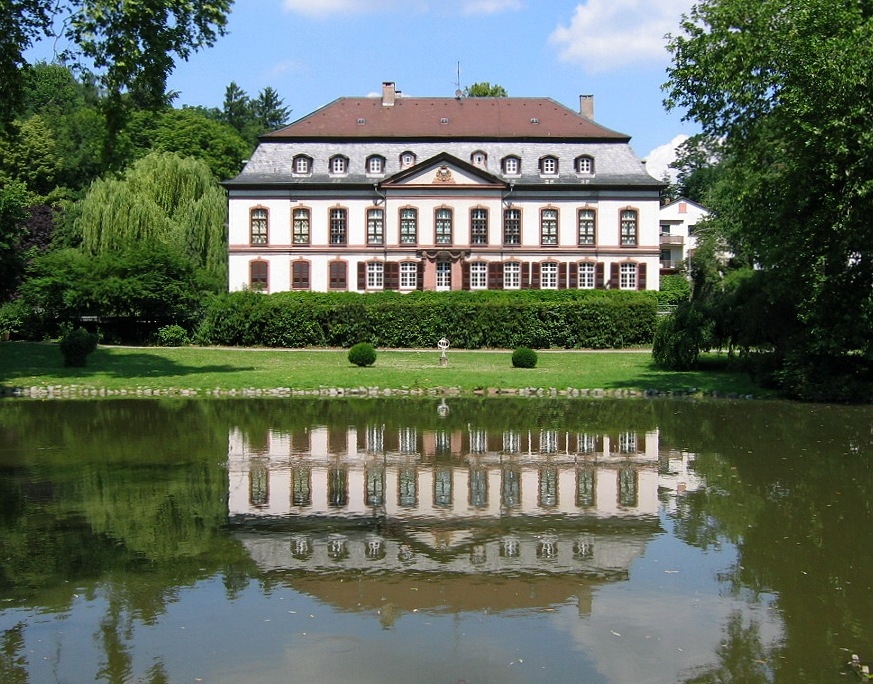 Das Wamboldt´sche Schloss in Birkenau/Hessen. Schloss Birkenau ist ein spätbarockes Schloss im gleichnamigen Ort Birkenau im Tal der Weschnitz nahe Weinheim. Es handelt sich um einen recht einfach strukturierten, aber dennoch beeindruckenden zweigeschossigen Bau mit einem angegliederten Schlosspark. Mit der Errichtung wurde 1765 im Auftrag des Freiherrn Wambolt von Umstadt durch den Speyrer Hofbaumeister Johann Leonhard Stahl in unmittelbarer Nähe eines Vorgängerbaus begonnen, bis 1779 (n.a.A. schon 1771 bzw. 1772) wurde das Schloss schließlich durch den kurpfälzischen Hofbaumeister Franz Wilhelm Rabaliatti fertiggestellt. Umbauten erfolgten im 19. und zu Anfang des 20. Jahrhunderts